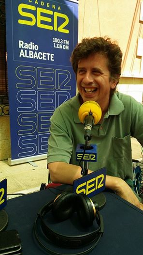 Gabino Diego hablando para Cadena Ser en su visita a Socovos en Agosto de 2014